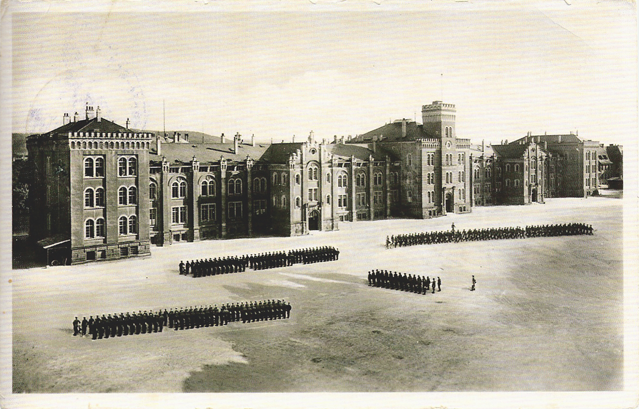 Thiepvalkaserne mit den Soldaten auf dem großen Exerzierplatz. (Fotoansichtskarte)